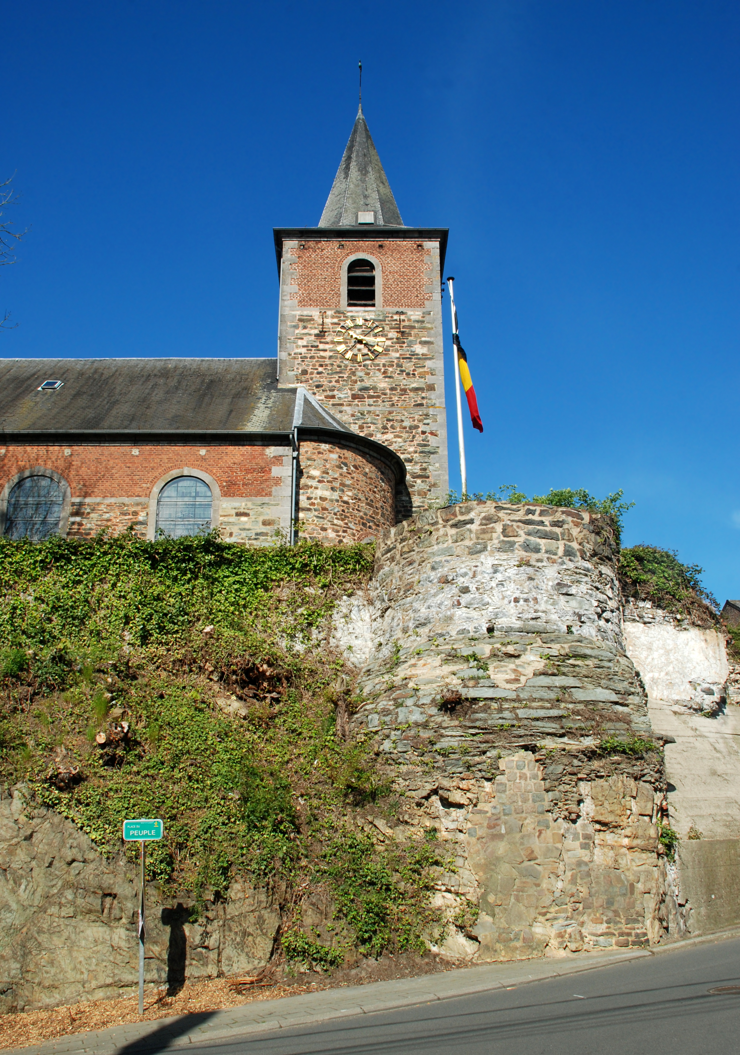 Belgique - Brabant wallon - Mont-Saint-Guibert - Église Saint-Guibert